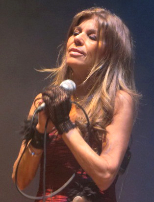 Cantante inglesa Jeanette en un concierto. (Arequipa 2014)